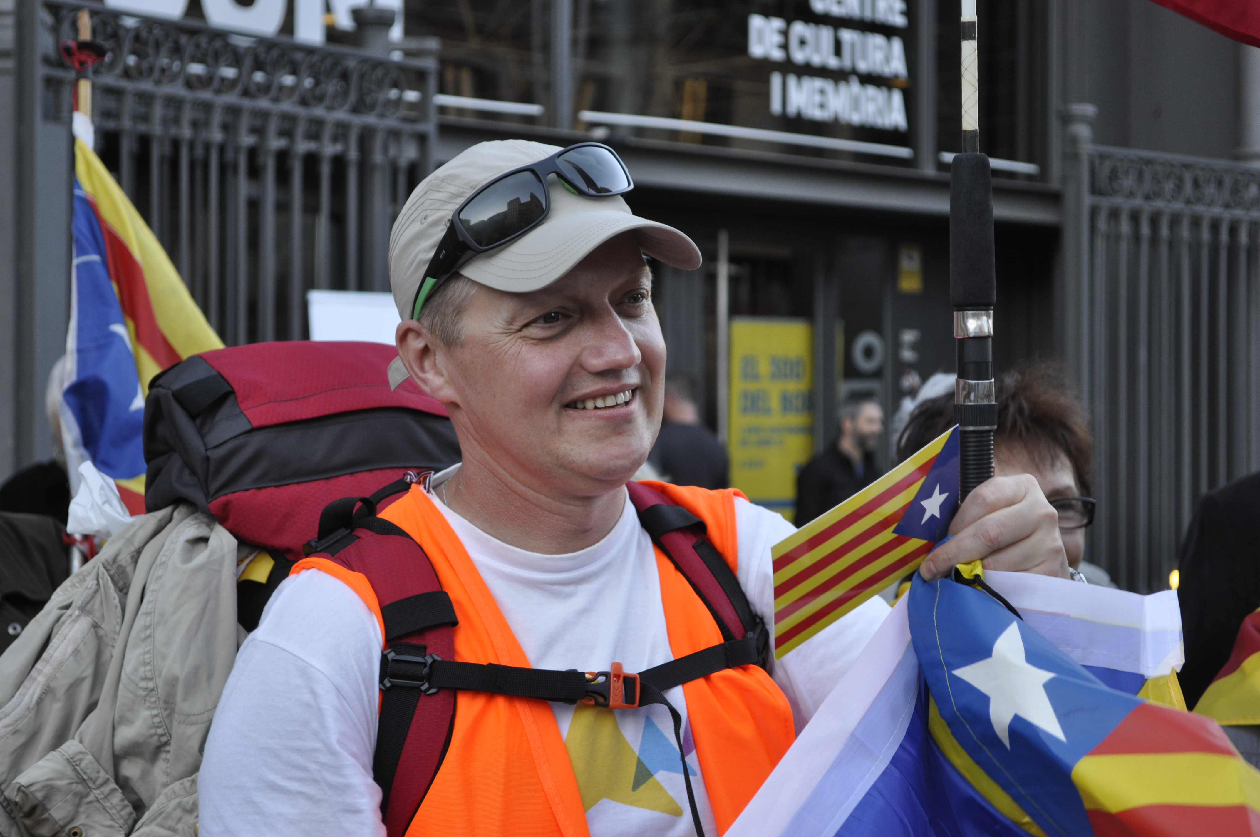 A l'abril del 2016 l'Otto va fer el recorregut de la Via Catalana, de més de 400 km des de les d'Alcanar al Pertús. Aquesta imatge està presa al Born, Barcelona.